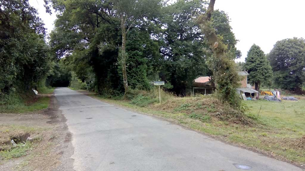 Vista de Rabuñas, Curtis.